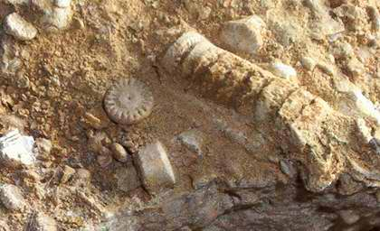 Eigenes Fundstück (Erkerode/Elm), eigenes Foto (Juergen Bode2003) Zum Artikel selbst angefertigt Juergen Bode 15:08, 14. Jul 2004 (CEST)